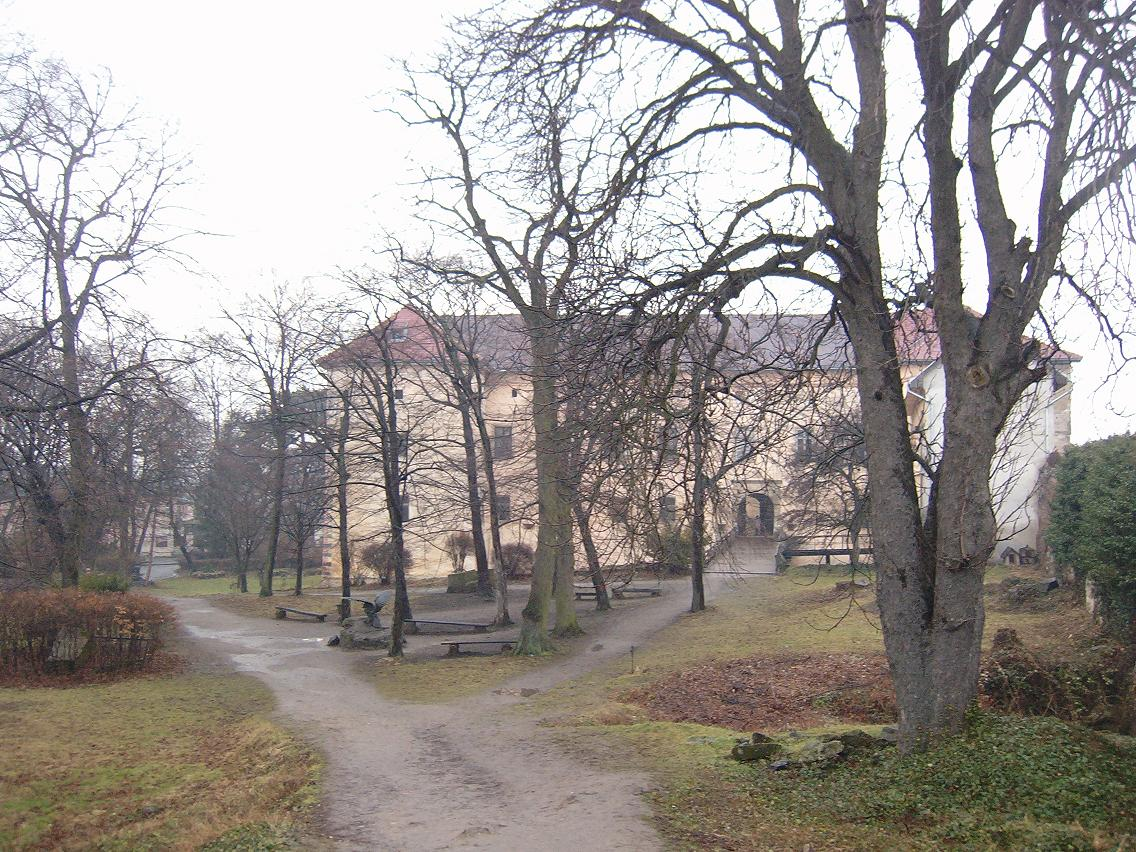 fotky z vyletu na ukrajine